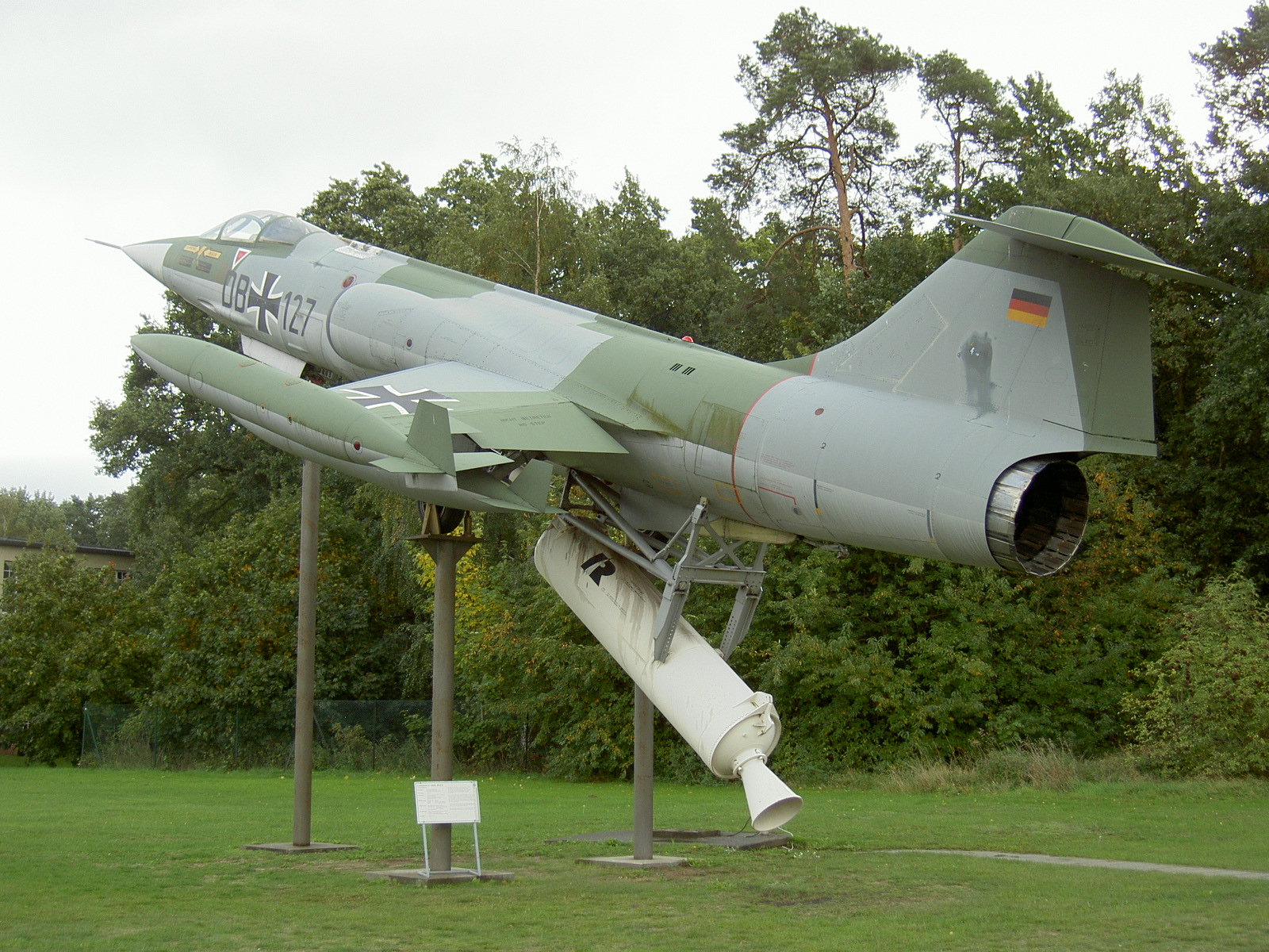 Lockheed F-104G ZELL Stfighter im Luftwaffenmuseum Berlin-Gatow